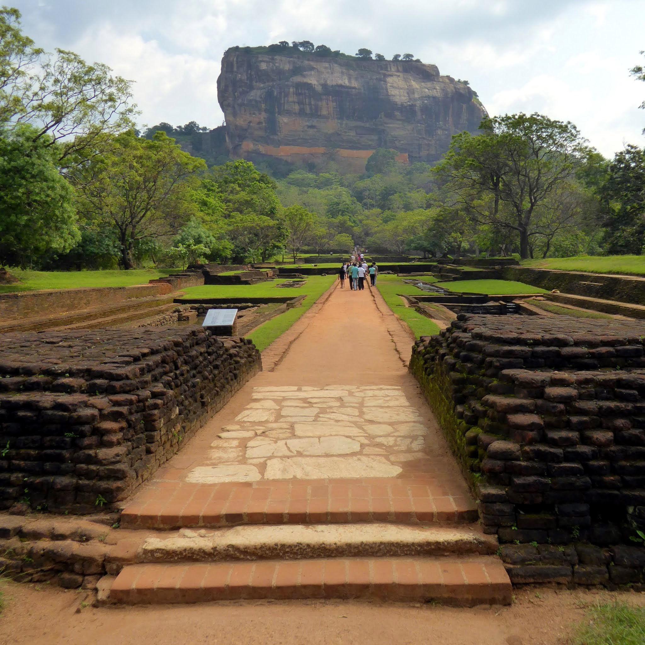 Water Garden, Sigiriya, Sri Lanka